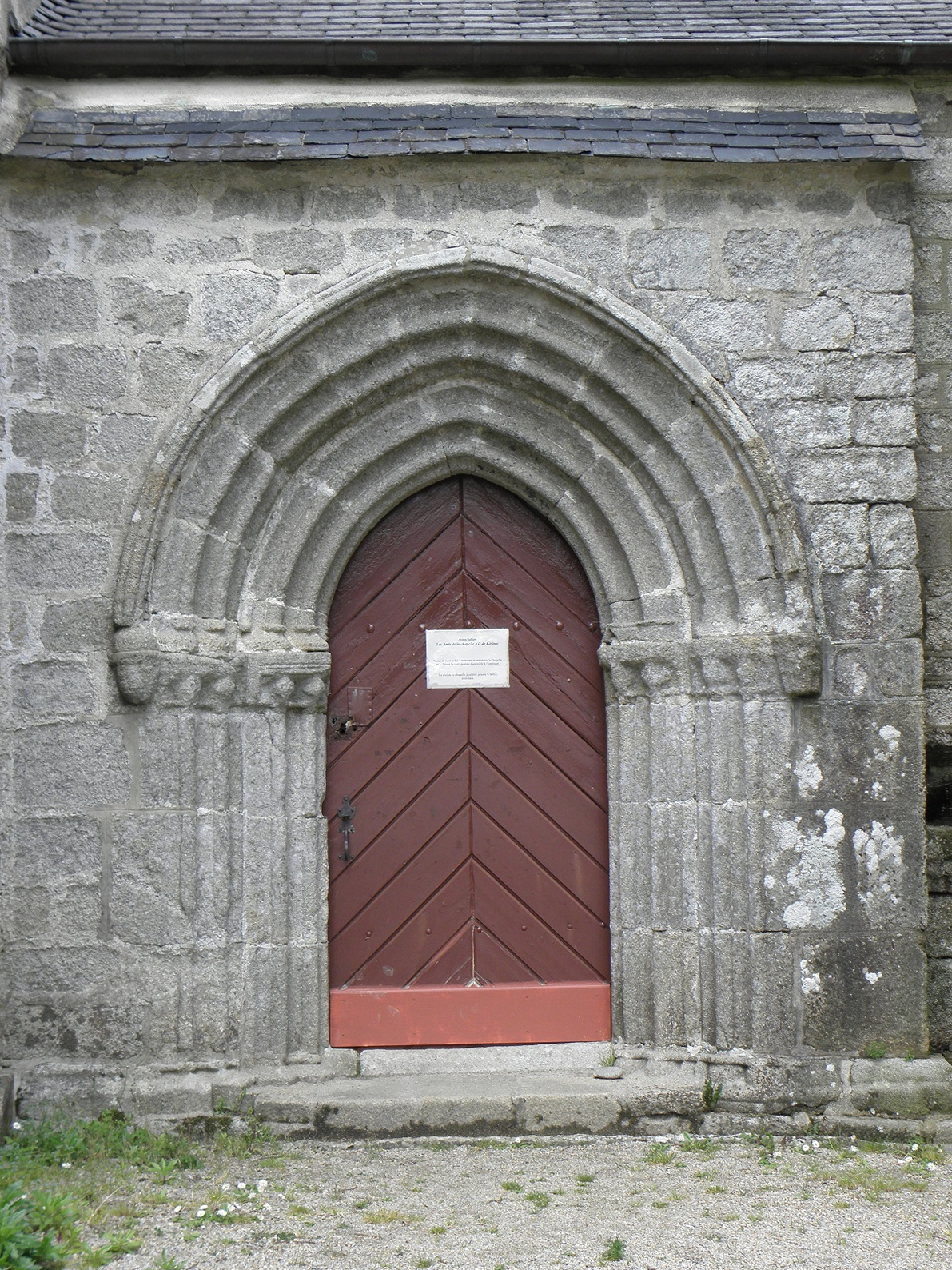 Seconde porte méridionale de la chapelle Notre-Dame-de-Kérinec en Poullan-sur-Mer (29).